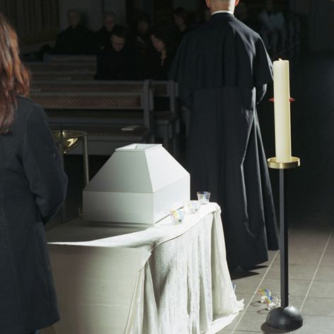 Trauergottesdienst für Sternenkinder 2007 in Karlsruhe. Erschienen in: Eltern, Heft 9/2007 Seite 112f: „Adieu, mein Sternenkind“ - Fehlgeburten